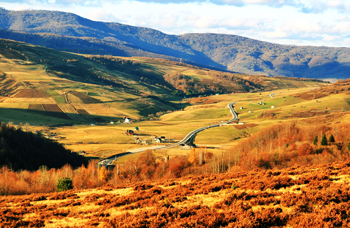 Rostovo